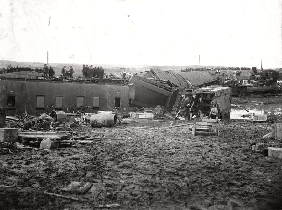 Фотография из журнала "Нива" разбора завалов после крушения поезда на перегоне Бокенгоф — Эльва